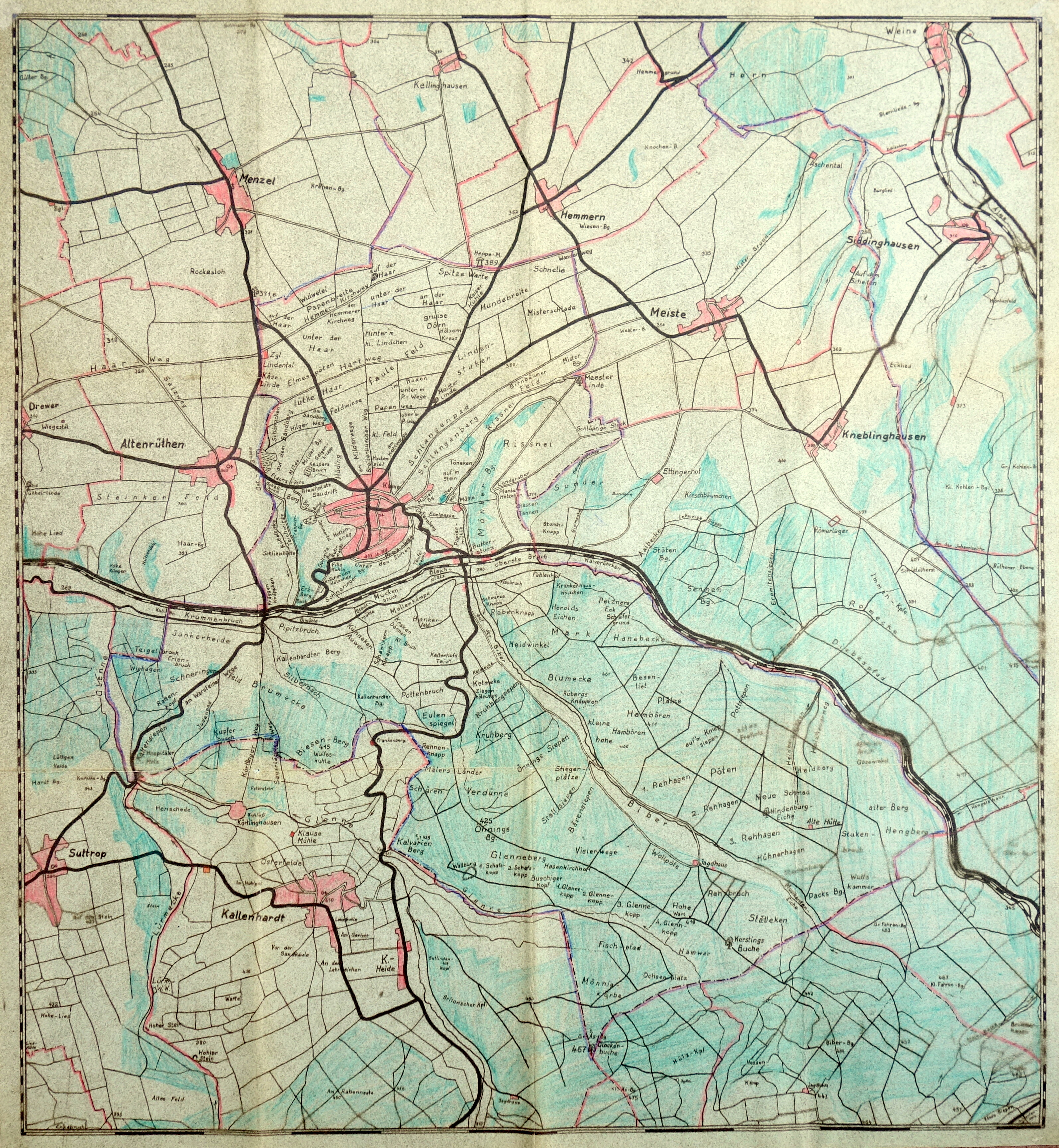 Karte "Flurnamen von Rüthen" von Eberhard Henneböle, 1949